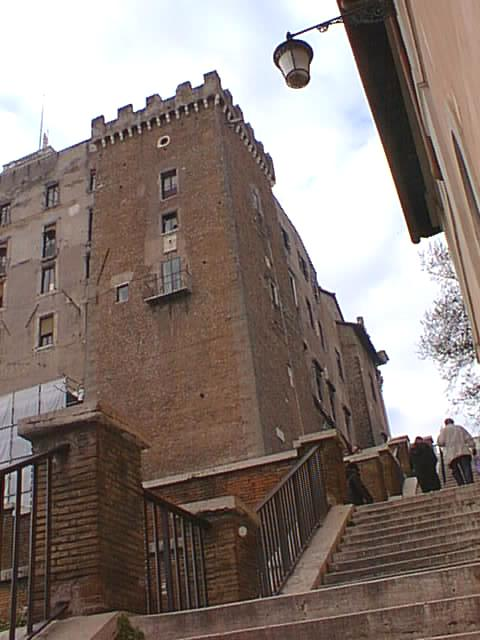 Roma, Campidoglio: la torre est salendo dal Foro, detta di Niccolò V